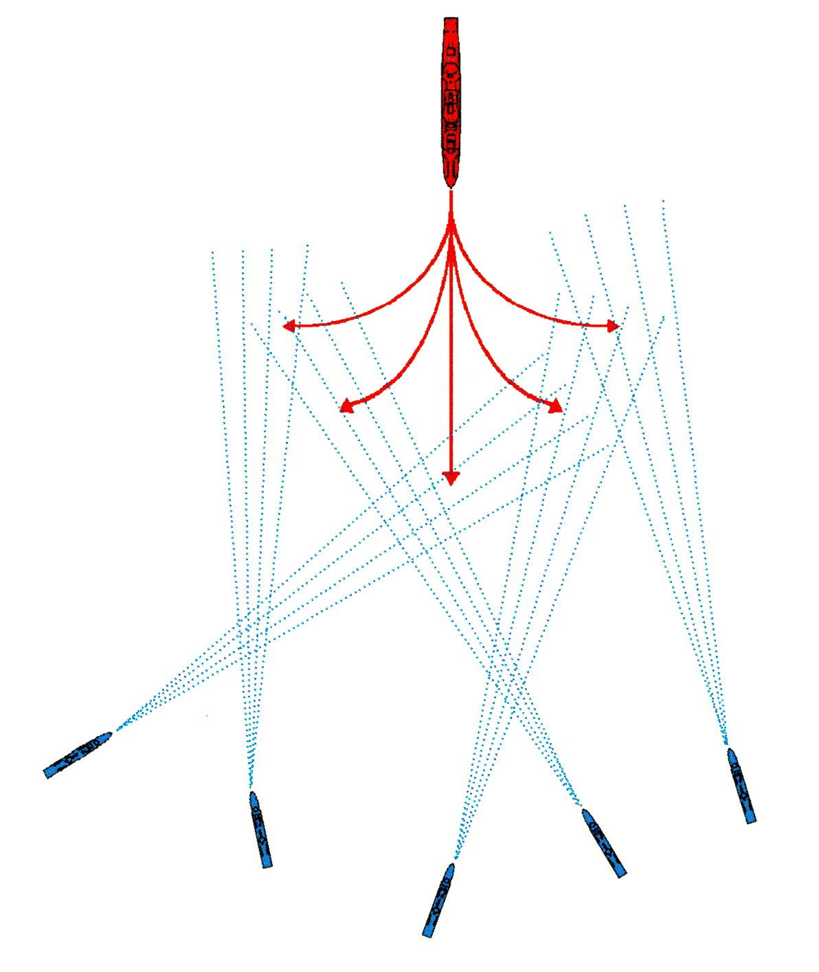 Schematische Darstellung eines Angriffs einer Schnellbootdivision mit der Torpedotaktischen Rechenscheibe. rot: Zielschiff mit Pfeilen der möglichen Kurse blau: Schnellboote mit gepunkteten Torpedoschussbahnen Die Größenverhältnisse und Entfernung sind nicht maßstabsgetreu. Schema nach einer Skizze der Marine Unterwasserwaffenschule. Gefunden in Hans Frank (Hrsg.): "Die Deutschen Schnellboote im Einsatz". Mittler Verlag Hamburg, Berlin, Bonn 2007. Seite 46.